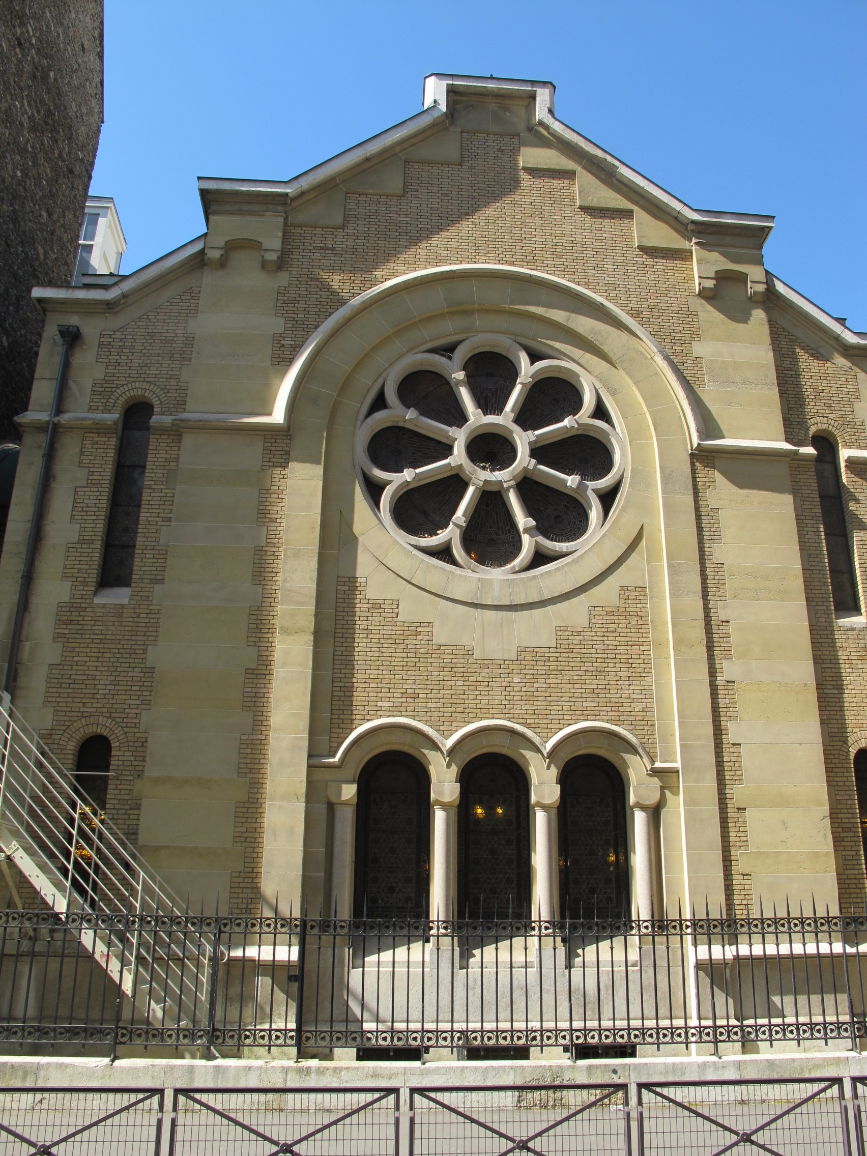 Synagogue Chasseloup-Laubat, Paris